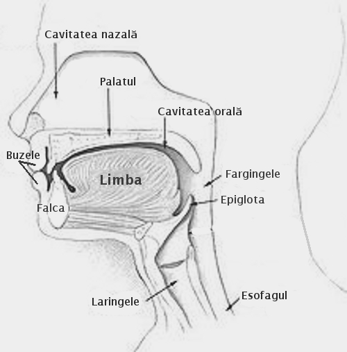 Cavitatea bucală - vedere din profil.